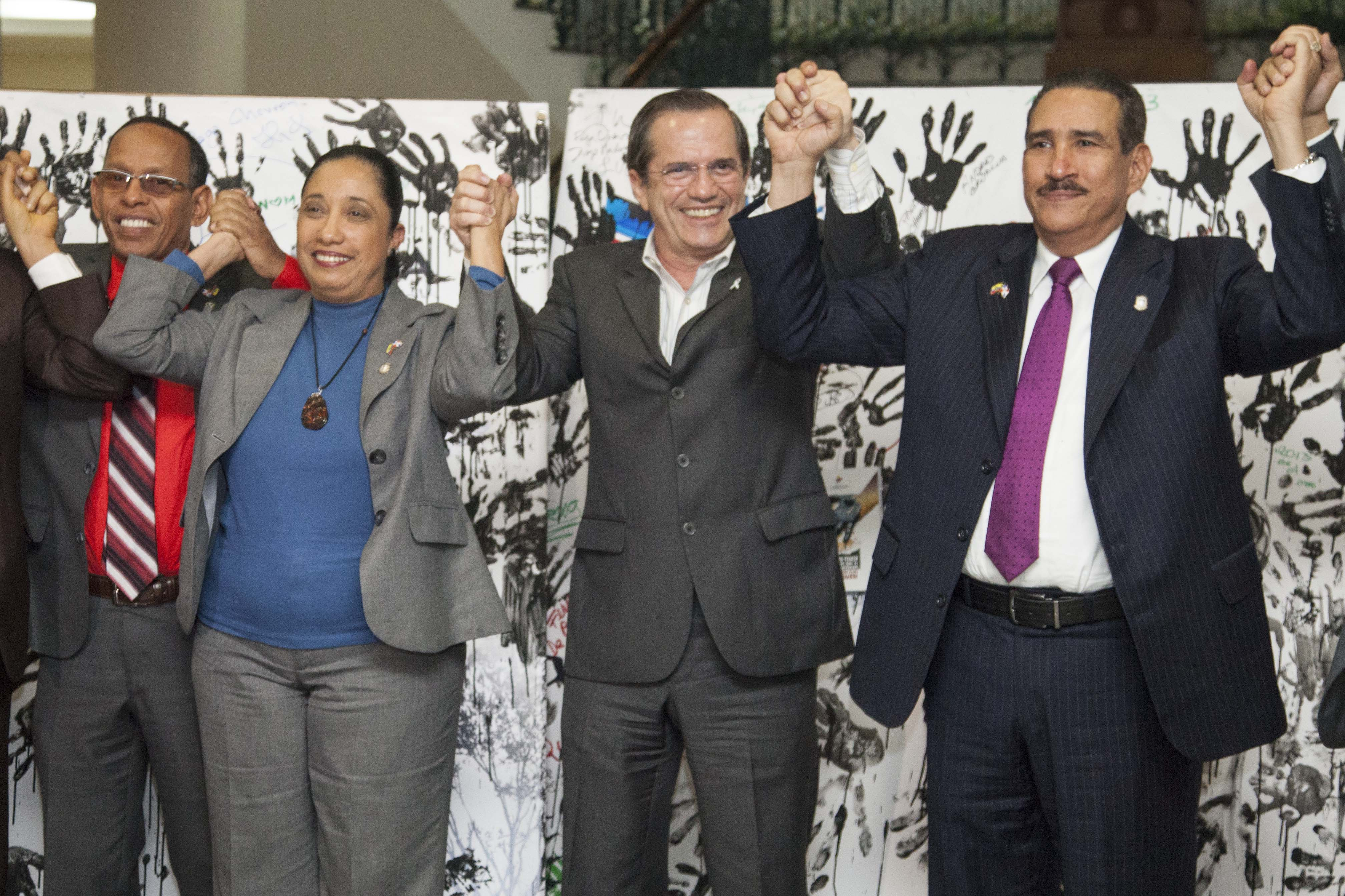 Quito (Ecuador), 26 de noviembre 2013. Diez parlamentarios de la Cámara de Diputados de República Dominicana, que son parte del Grupo Parlamentario de Amistad Dominico – Ecuatoriano, expresaron su apoyo al Estado y pueblo del Ecuador frente a la campaña de desprestigio que emprendió Chevron – Texaco en contra del país. Fueron recibidos en el despacho por el Canciller Ricardo Patiño, y en una rueda de prensa conjunta dieron a conocer los alcances de la Resolución adoptada por el Parlamento dominicano a favor del Ecuador. Foto: Fernanda LeMarie - Cancillería del Ecuador.